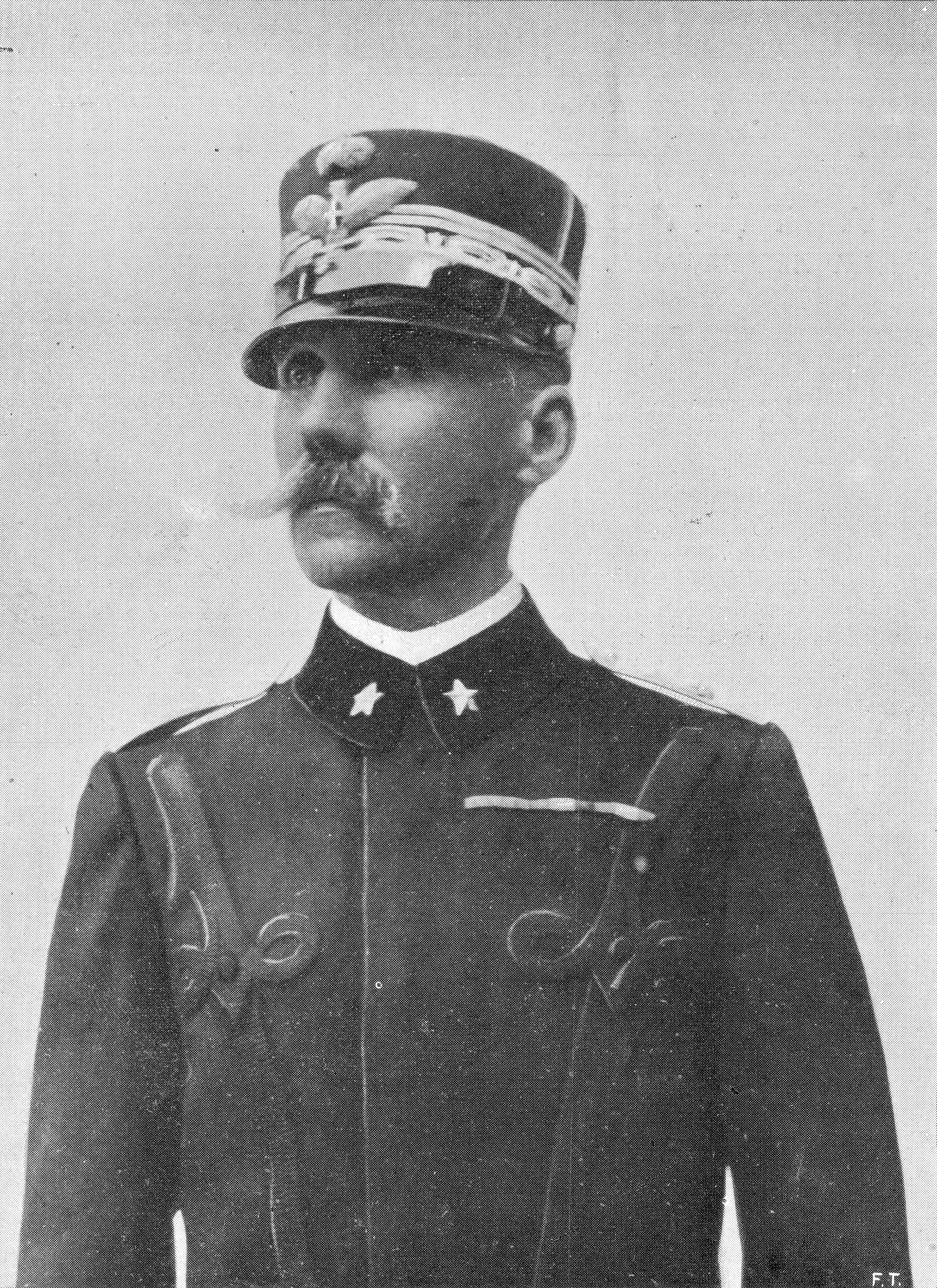 Generale Pietro Frugoni